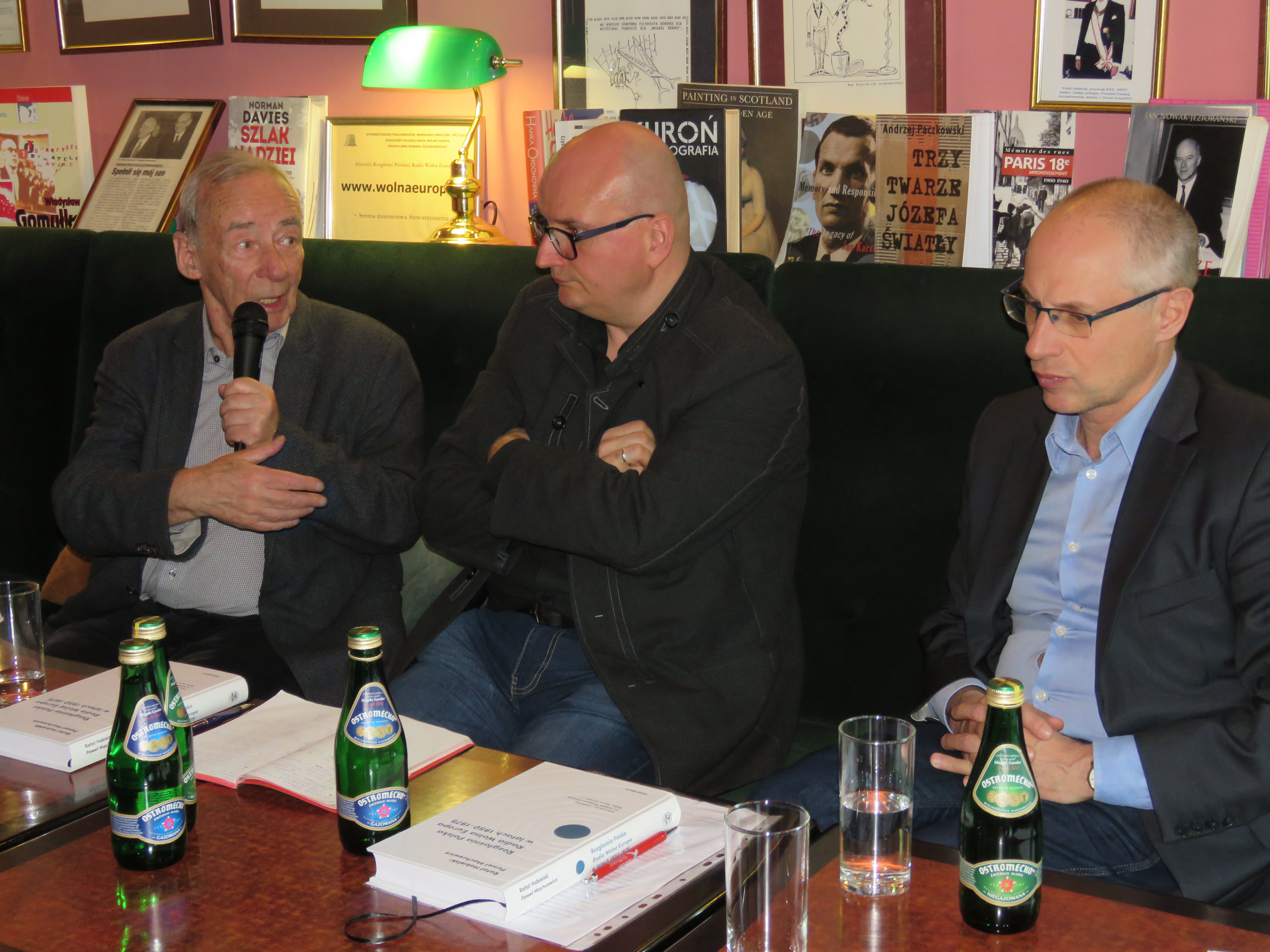 Andrzej Paczkowski, Sławomir Łukasiewicz, Paweł Machcewicz - Polish historians.